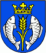 Logo Malé Chyndice